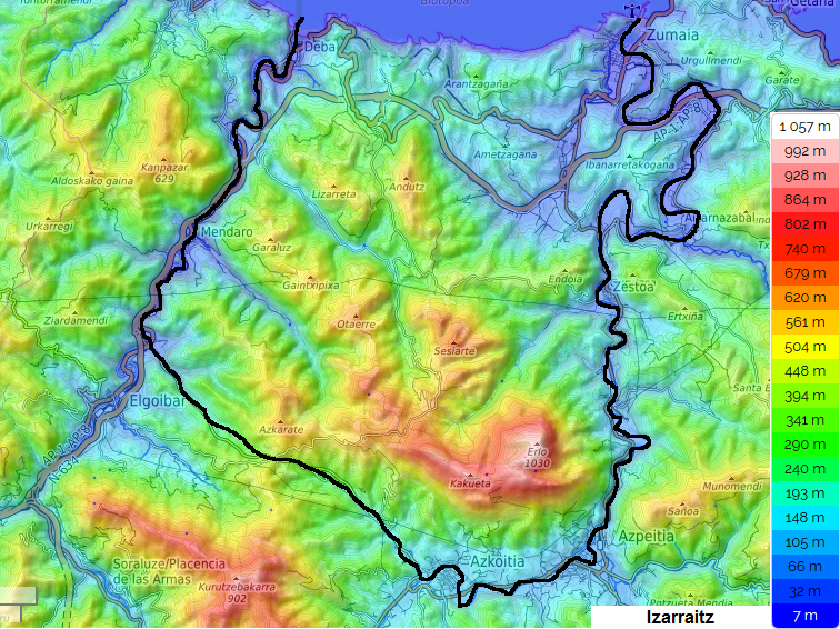 Izarraitzeko mendilerroaren mapa topografikoa.